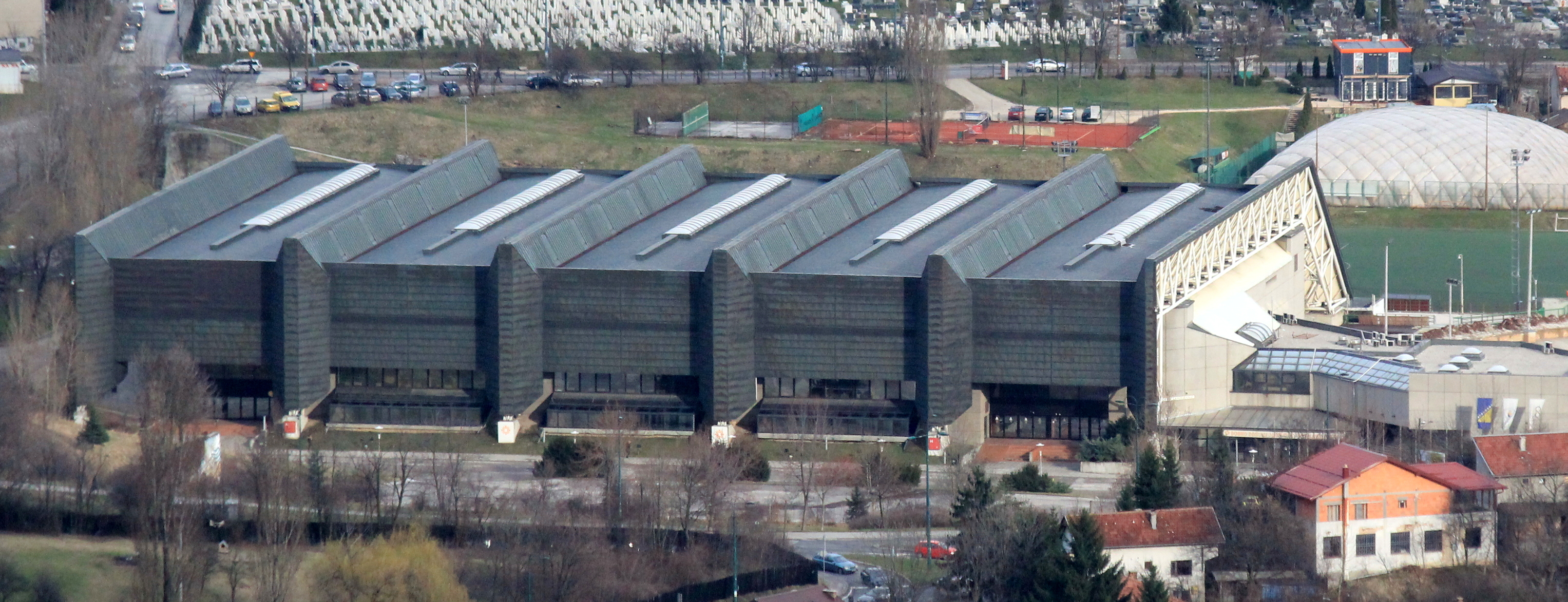 Blick vom Berg Hum auf Sarajevo.